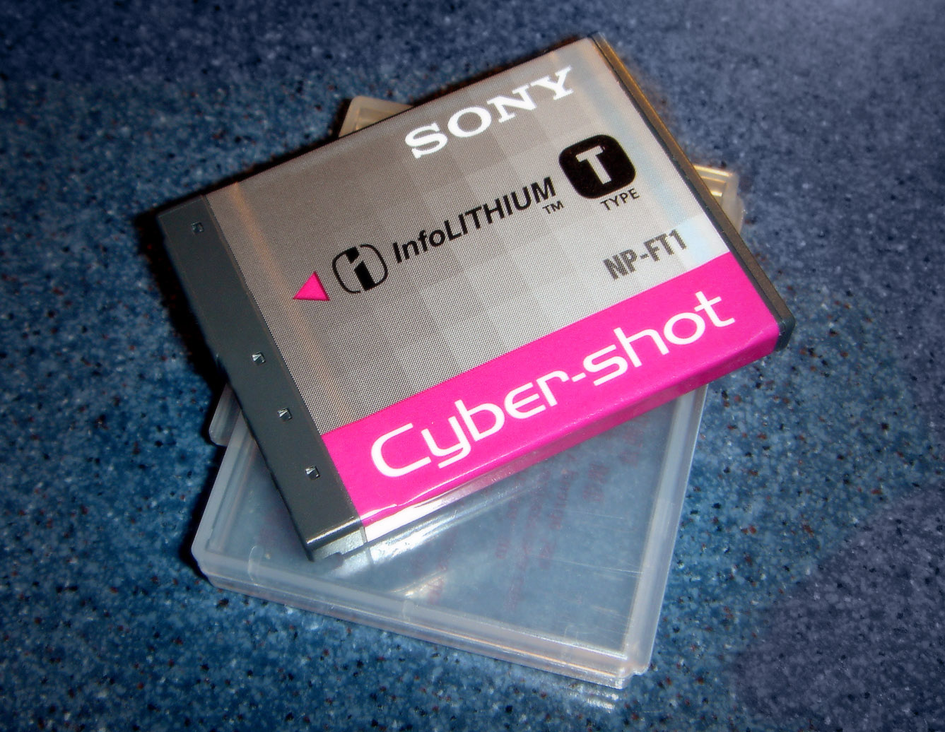 Beschreibung: Ein Lithium-Ionen Akku (Li-ion) für SONY-Digitalkameras der Marke Cybershot.